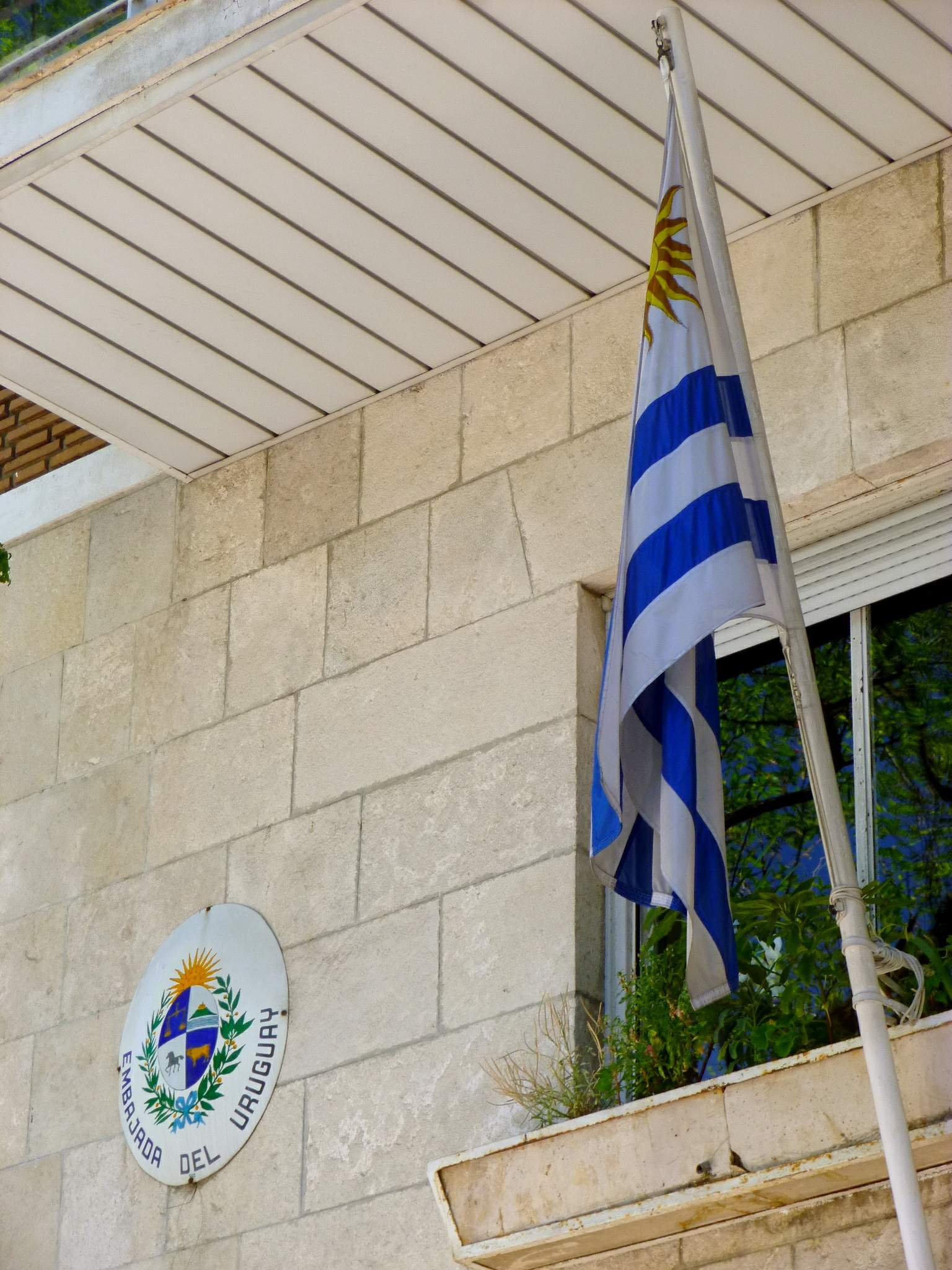 Embajada de Uruguay en Madrid.